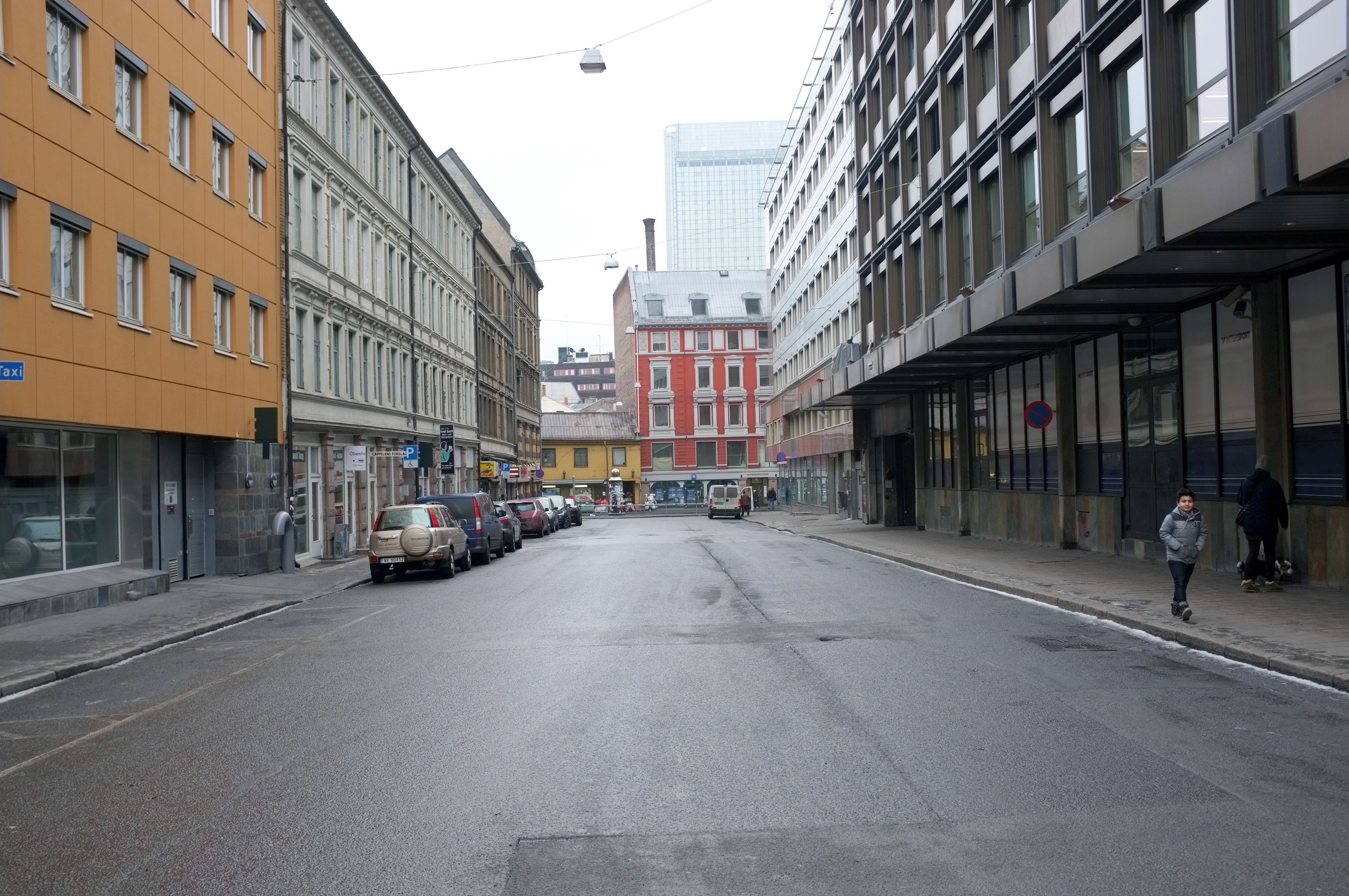 Bernt Ankers gate i OSlo.